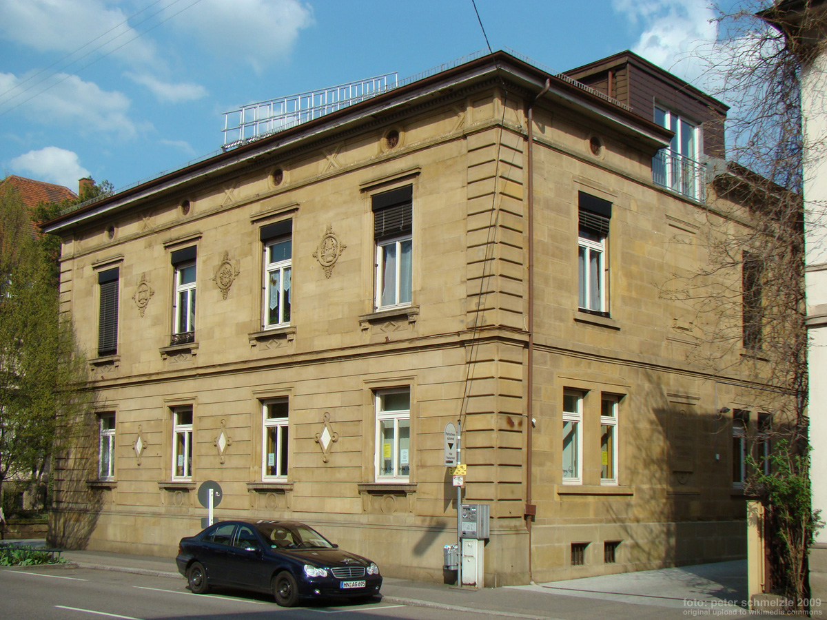 Villa Kübel, Wilhelmstraße 11 in Heilbronn